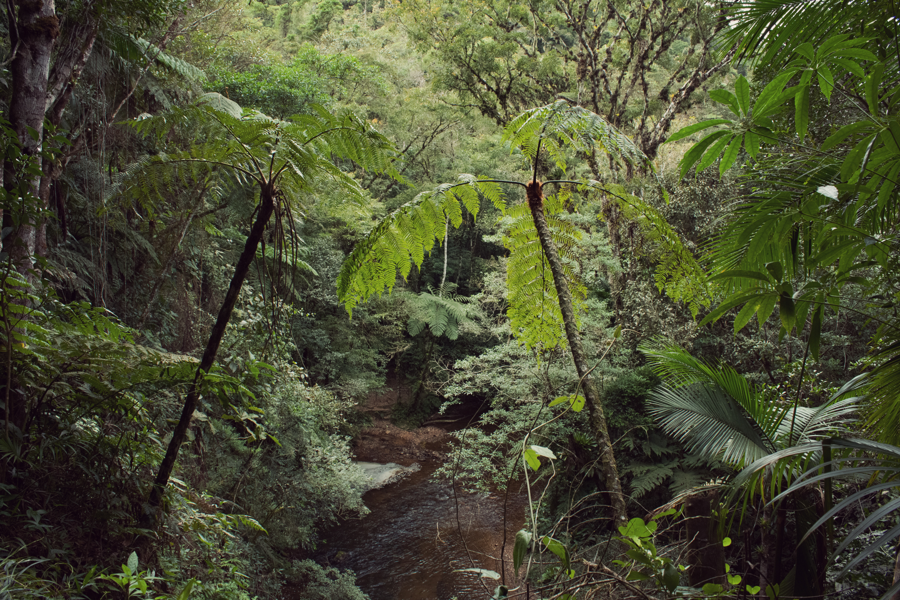 Vista do rio Taquaral